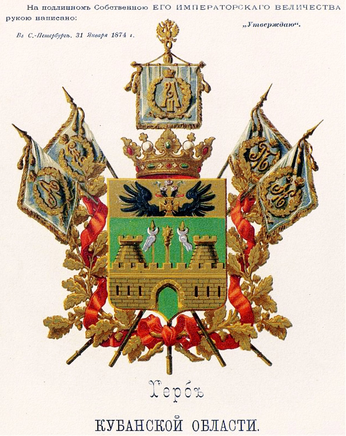 Official Russian Empire coat of arms Kuban Oblast. Герб Российской Империи Кубанской области в Гербовнике Бенке. Утверждён Императором Всероссийским Александром Вторым в 1874 году.